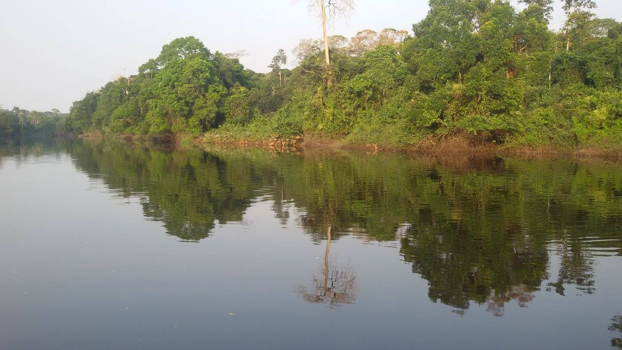 plus vastes et les mieux protégées : 90 % de sa superficie restant inviolée. C’est l’une des forêts humides d’Afrique les plus vastes et les mieux protégées, 90 % de sa superficie restant inviolée. Pratiquement encerclée par le fleuve Dja, qui en forme la limite naturelle, la réserve est surtout remarquable pour sa biodiversité et pour la très grande variété des primates qui y vivent. Elle abrite 107 espèces de mammifères, dont cinq sont menacées.